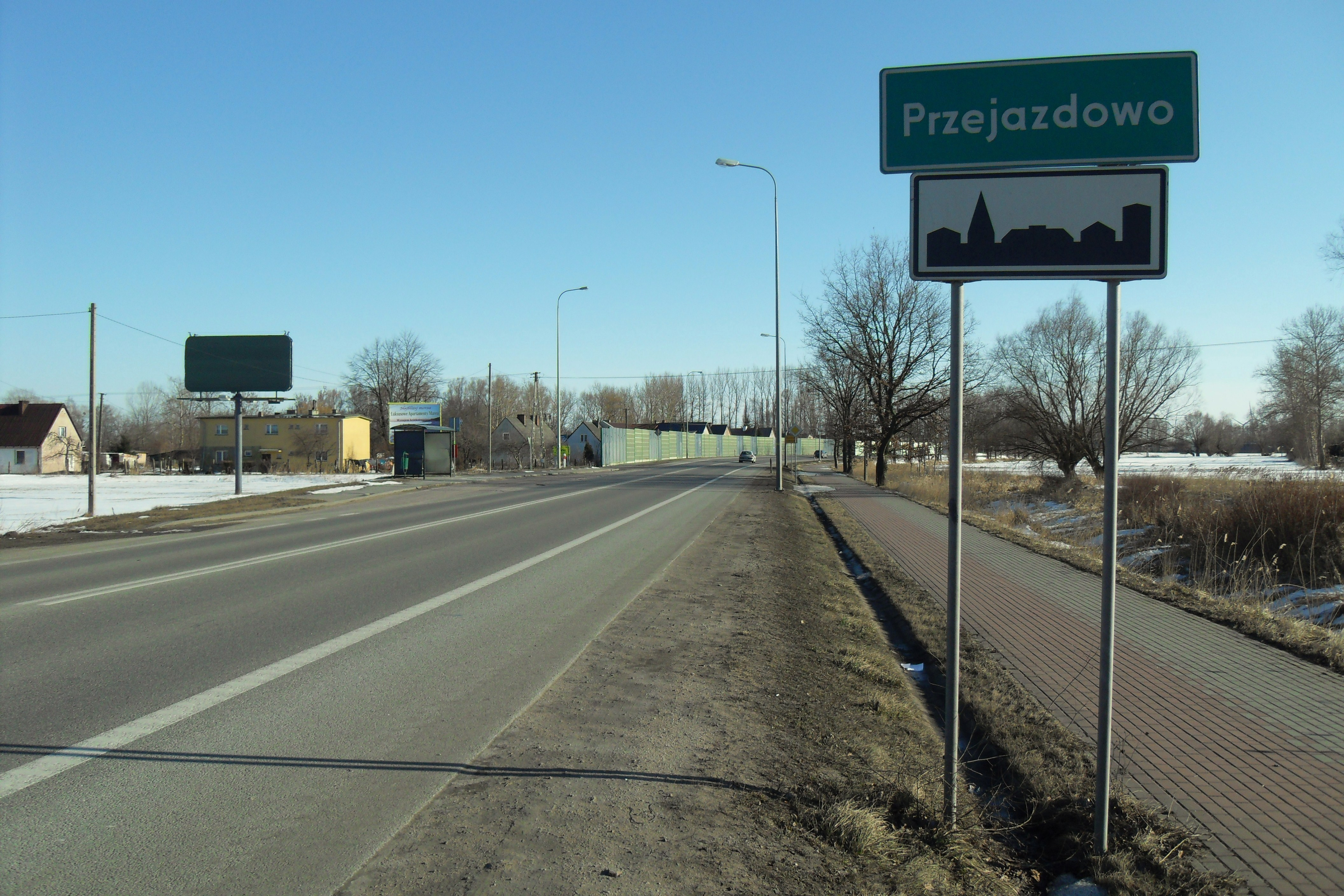 Przejazdowo, gmina Pruszcz Gdański (województwo pomorskie). Dawna droga krajowa nr 7.